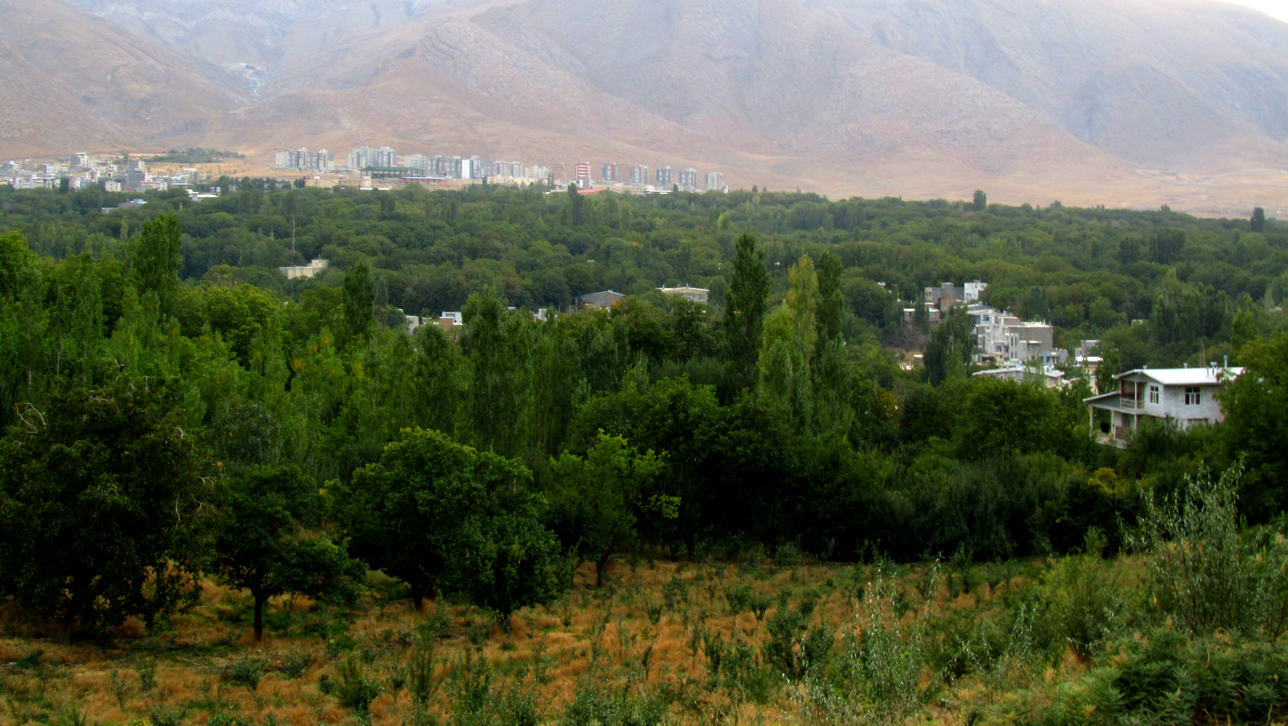 خوانسار سبز